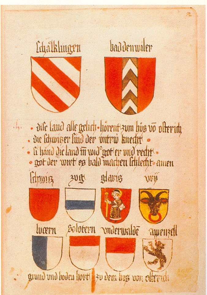 Ingeram-Codex der ehemaligen Bibliothek Cotta schaelkingen baddenwiler . dise land alle gelich . hörent zum hus vo(n) osterich/ . die schwizer sind der untr(e)w knecht./ . si hand die land in(n) wid(er) got e(h)r und recht./ . got der wirt es bald machen schlecht. amen schwiz zug glaris vry (Uri) lucern solotern underwalde(n) appenzell grund und boden hort zu dem hus von osterich/